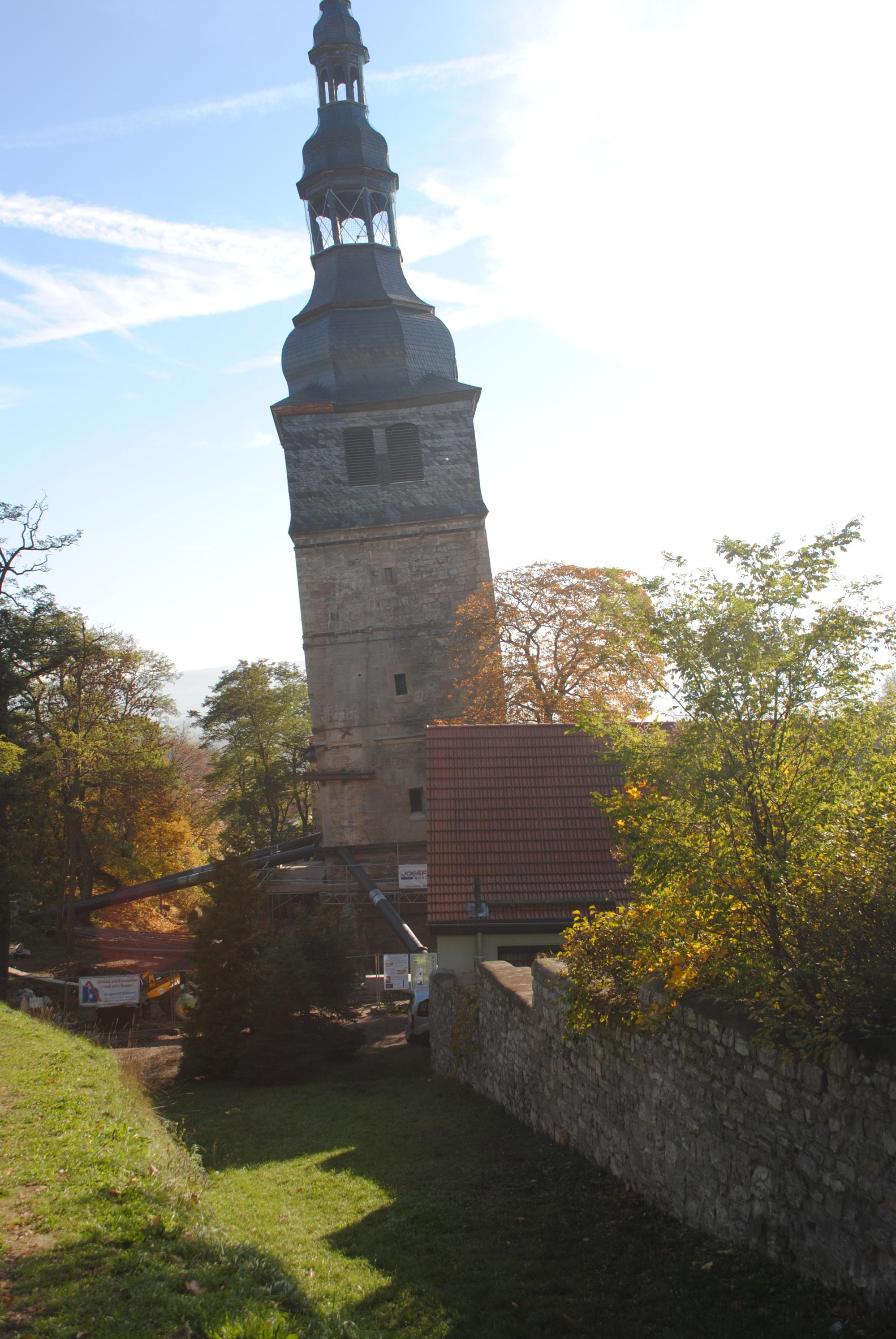 schiefer Turm der Oberkirche in Bad Frankenhausen, am Sockel Baustelle